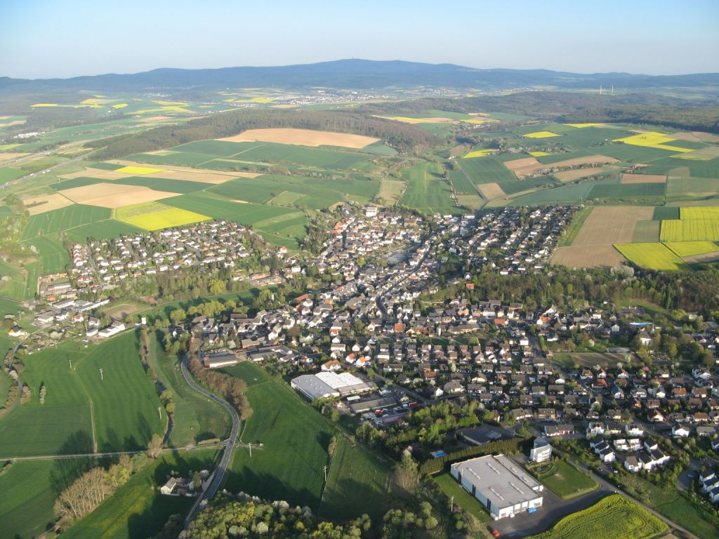 Luftbild (Heißluftballonfahrt): Hünfelden-Dauborn mit dem Goldenen Grund und dem Großen Feldberg im Hintergrund zum Östlichen Hintertaunus und Hochtaunus